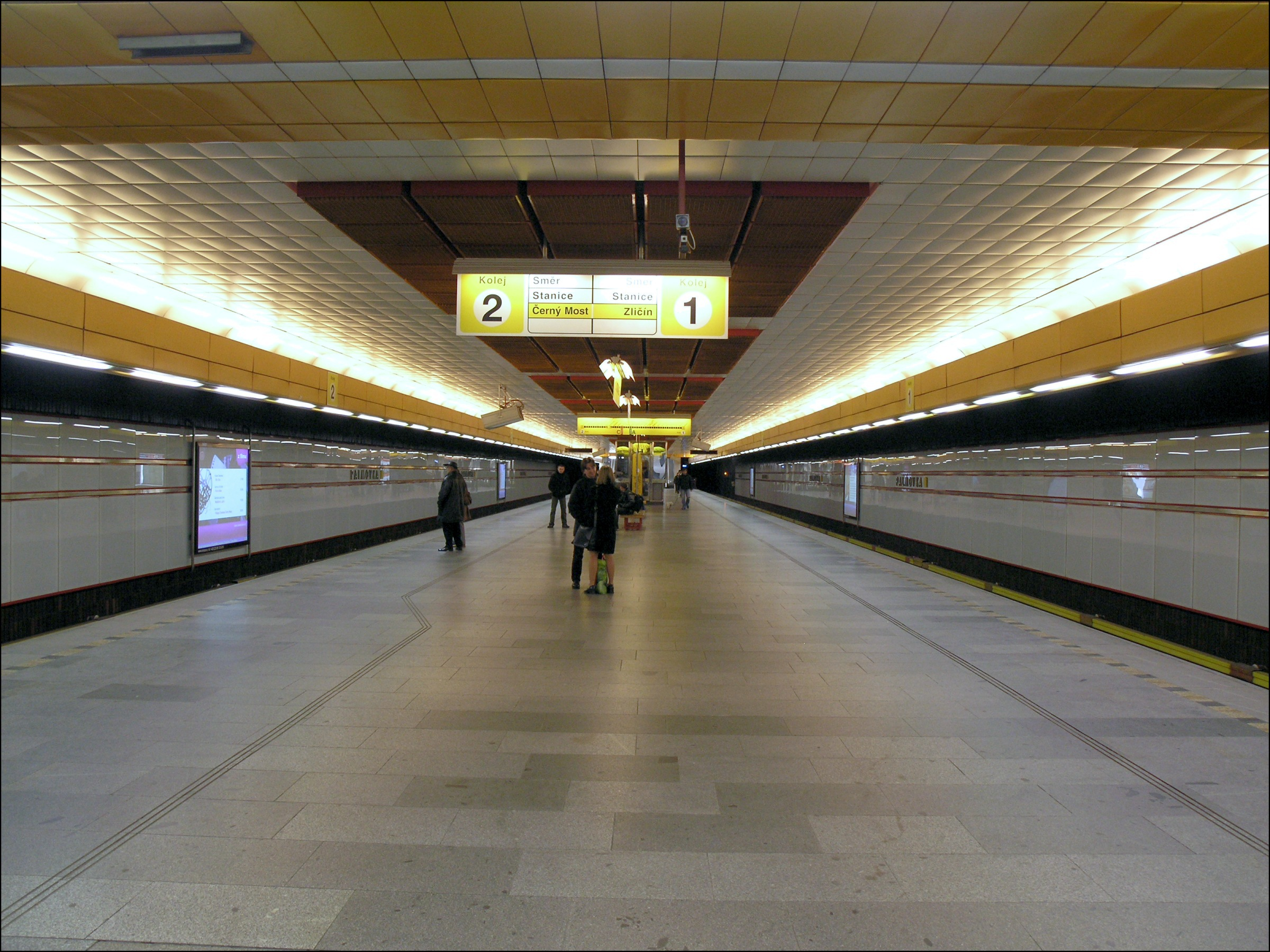 Česky: Stanice metra Palmovka